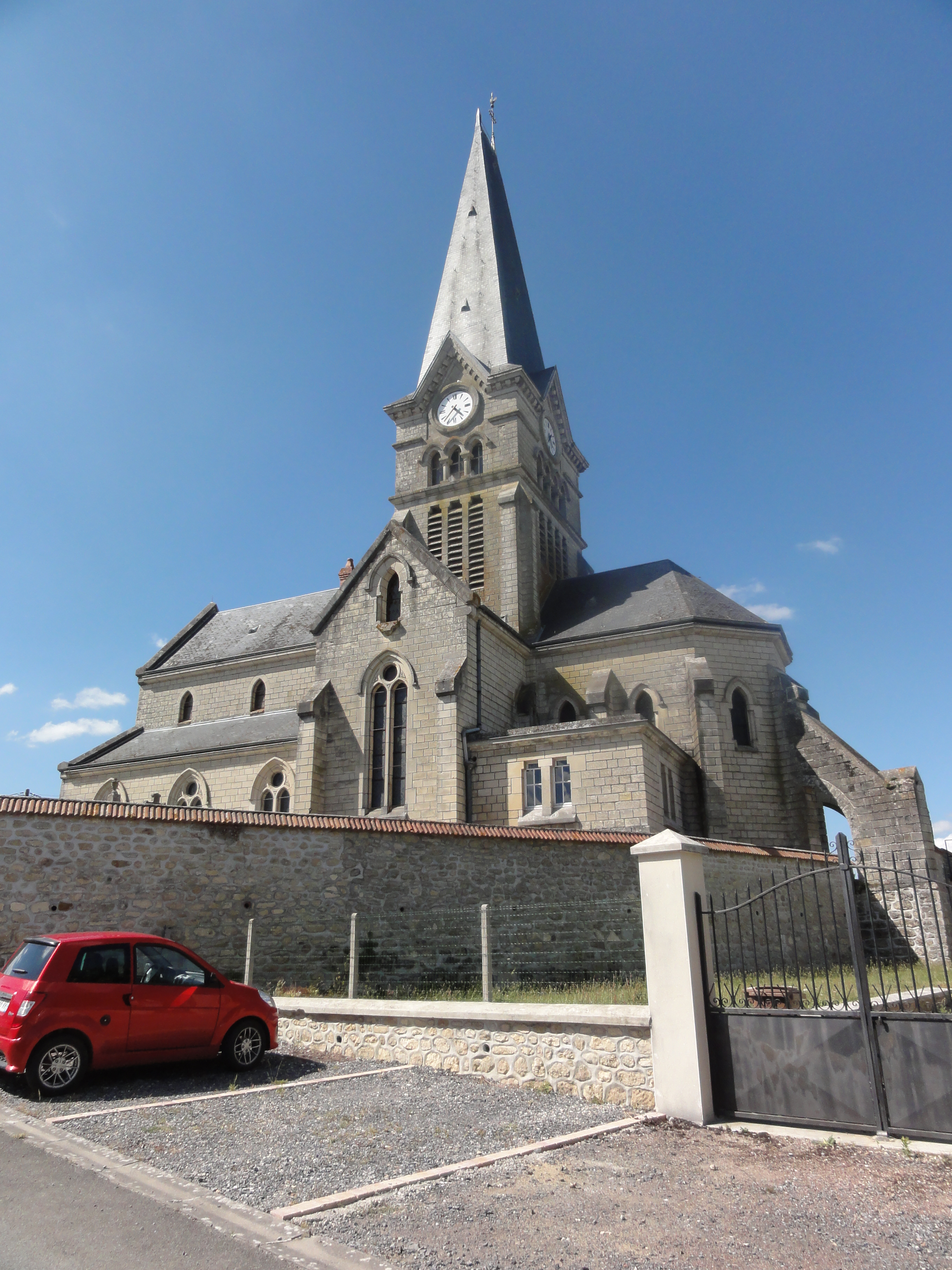 Berrieux (Aisne) église